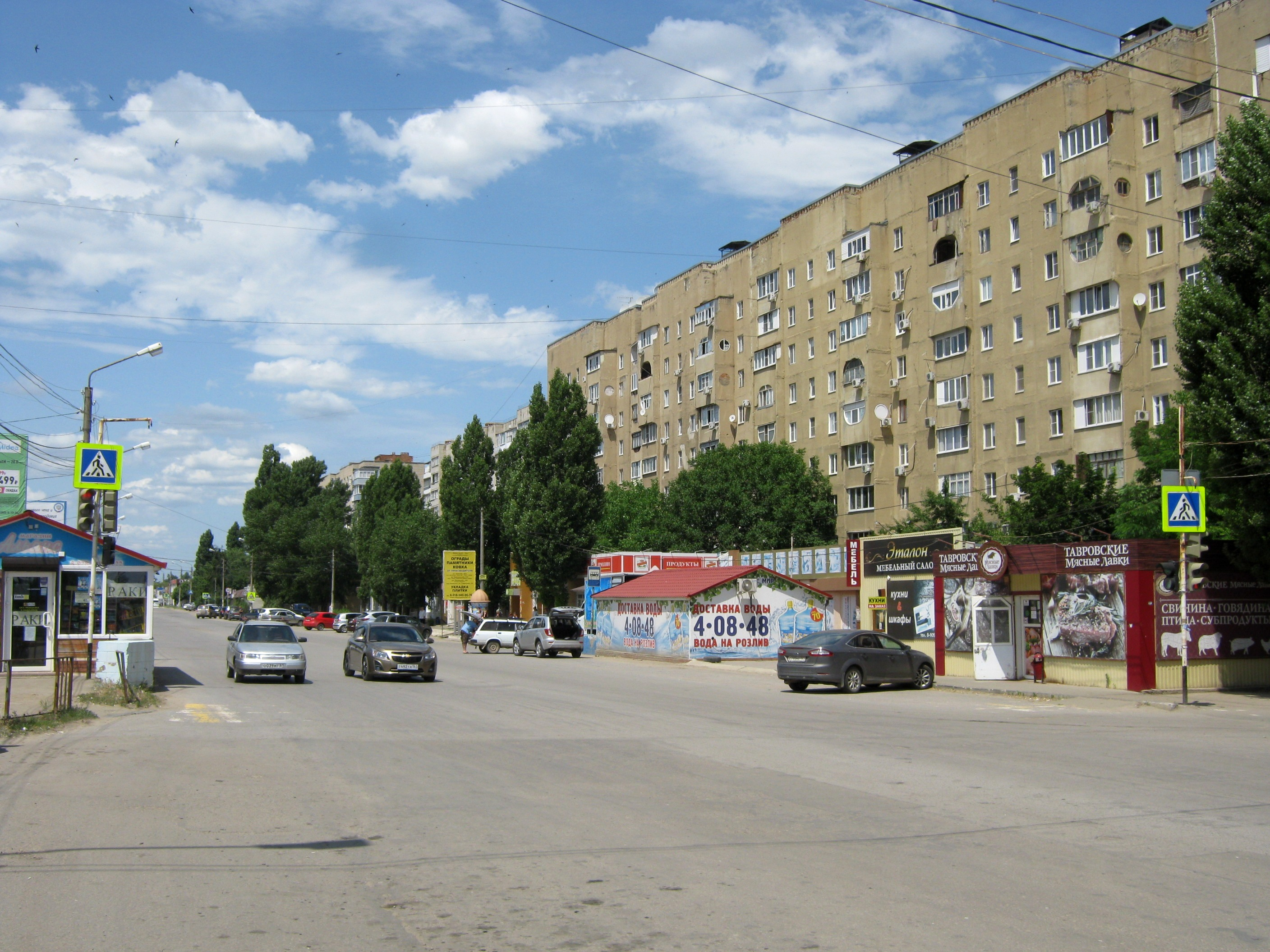 Каменск - Ворошилова 159